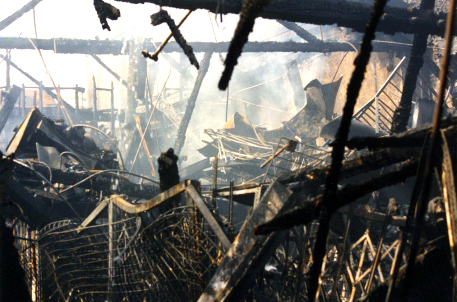 Hollywood Blvd